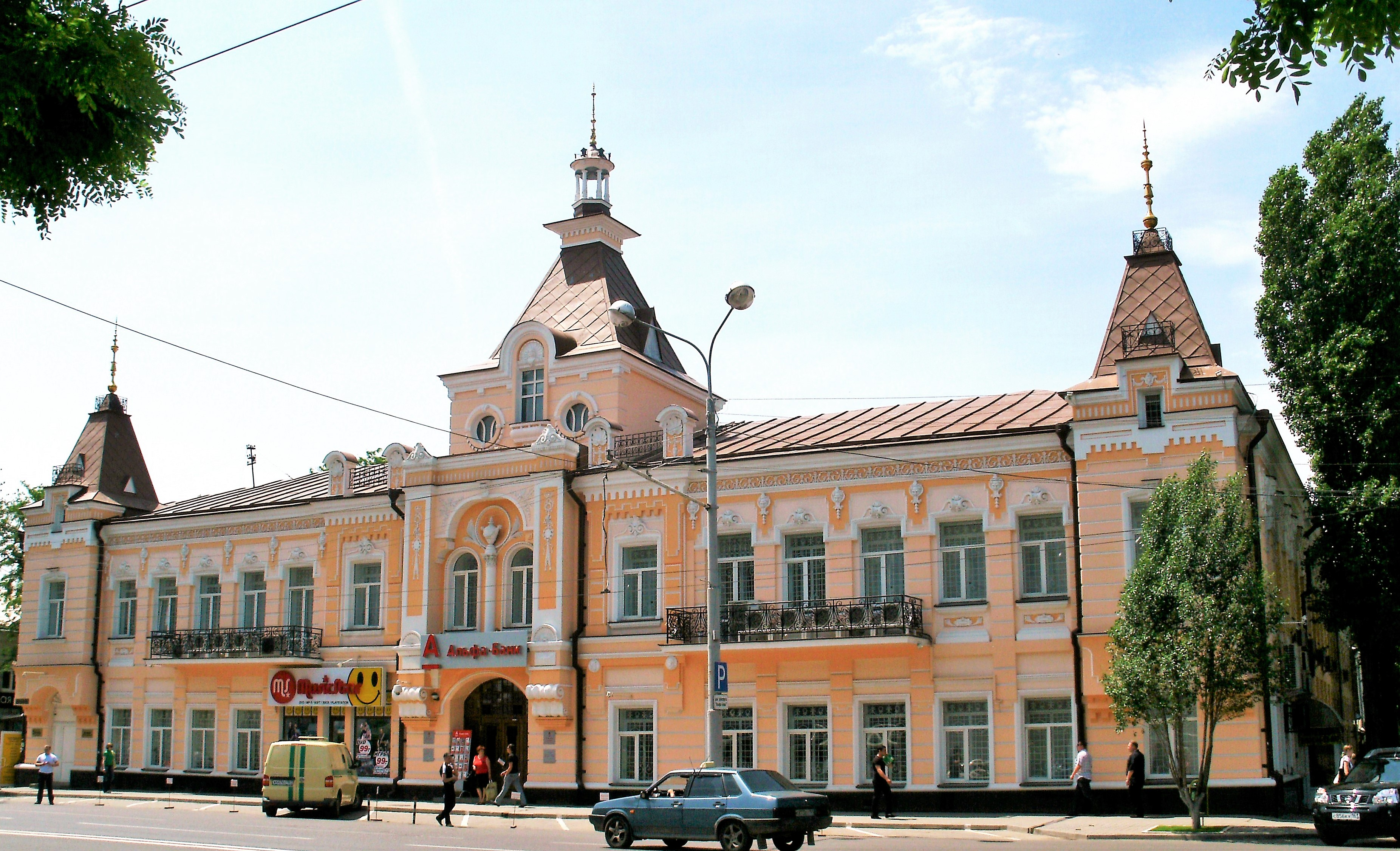 Бывший доходный дом С. Шендерова. Здание расположено в историческом центре города на Ворошиловском проспекте (бывший Большой проспект). Построено в конце XIX в. по проекту архитектора Н.М. Соколова. Памятник истории и культуры регионального значения. Первый этаж центральной части арендовали магазин и торговые фирмы, второй этаж занимали апартаменты владельца. В северном и южном крыльях дома размещались жилые помещения, сдаваемые в наем. В начале 1920-х гг. здание было национализировано. Первый этаж использовался для торговли, на втором разместили коммунальное жилье. В 1942 г. во время бомбардировок города был разрушен центральный шатер, увенчанный ротондой. Восстановление было произведено в конце 50-х годов по проекту архитекторов М. Н. Ишунина и Г. А. Петрова. В 2005-2006 гг. на средства Альфа-банка (расположенного в этом здании) были выполнены ремонтно-реставрационные работы, в ходе которых восстановлен фасад здания и утраченный центральный шатёр. (Из Интернета)